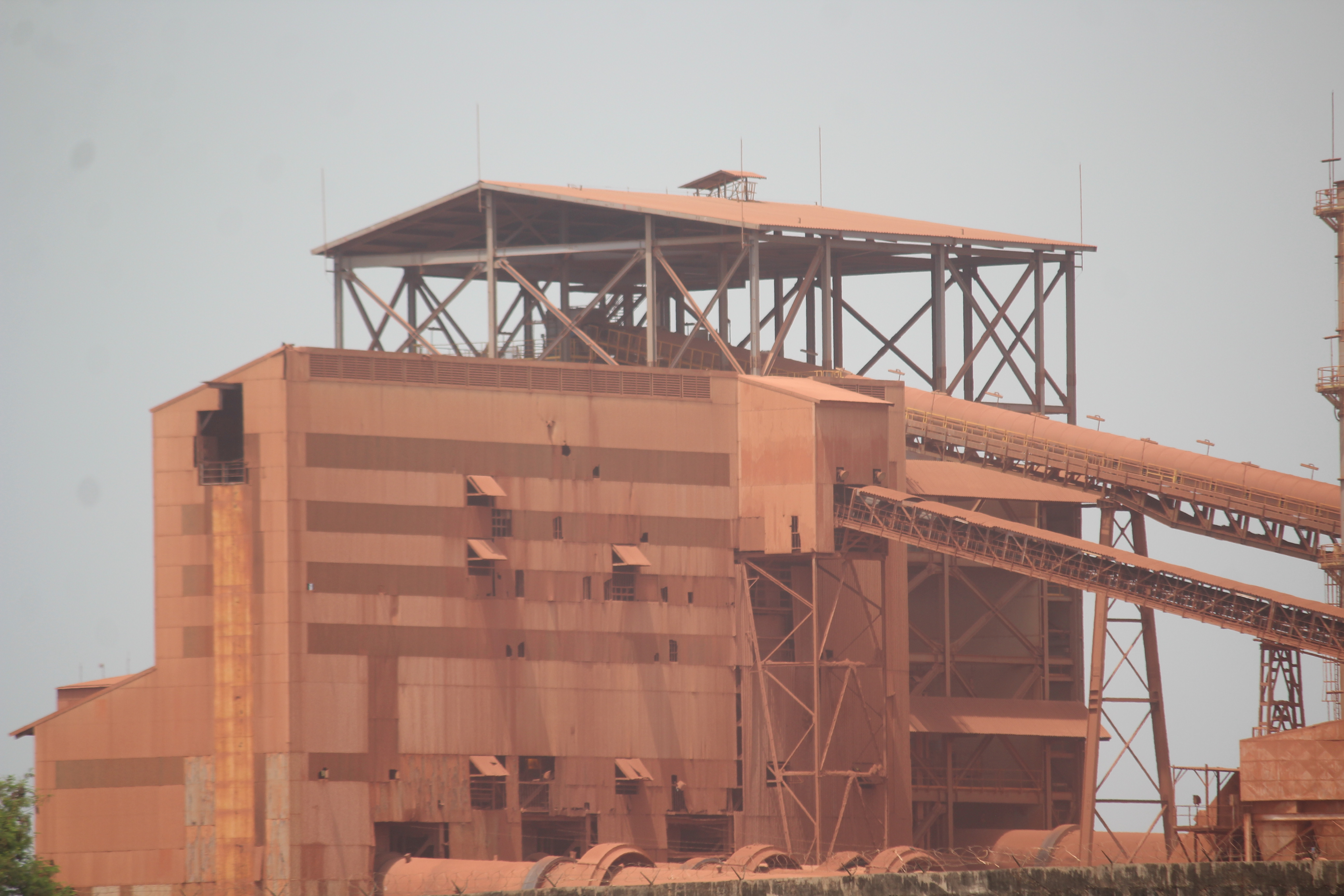 CBG a Kamsar Guinée This is an image with the theme "Africa on the Move or Transport" from: Guinea